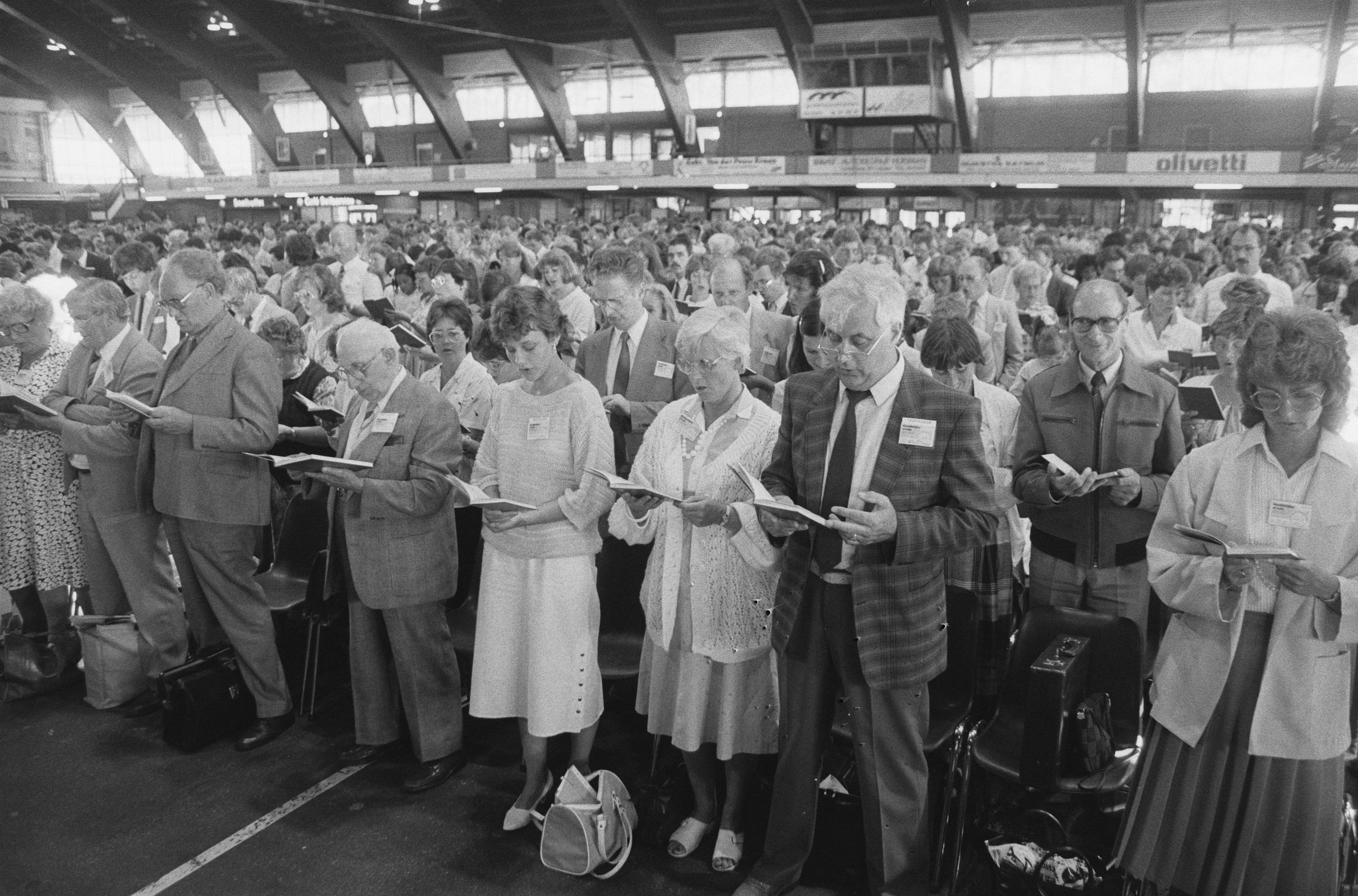 Collectie / Archief : Fotocollectie Anefo Reportage / Serie : [ onbekend ] Beschrijving : "Goddelijke vrede" Congres van Jehovas Getuigen in de Groenenoordhallen te Leiden Datum : 31 juli 1986 Locatie : Leiden, Zuid-Holland Trefwoorden : congressen Persoonsnaam : Jehovas Getuigen Fotograaf : Molendijk, Bart / Anefo Auteursrechthebbende : Nationaal Archief Materiaalsoort : Negatief (zwart/wit) Nummer archiefinventaris : bekijk toegang 2.24.01.05 Bestanddeelnummer : 933-7201